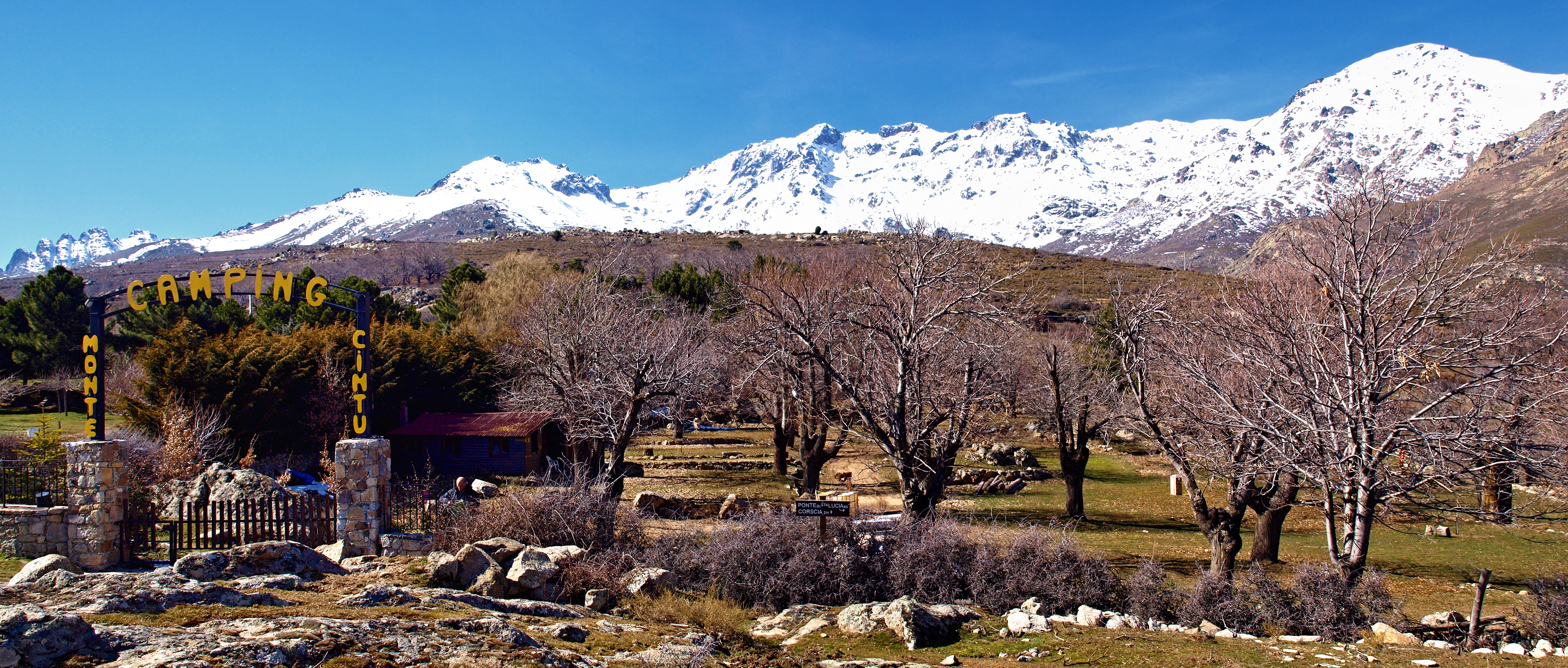 Lozzi (Corsica) - Camping à 1080 m d'altitude sous Monte Cinto